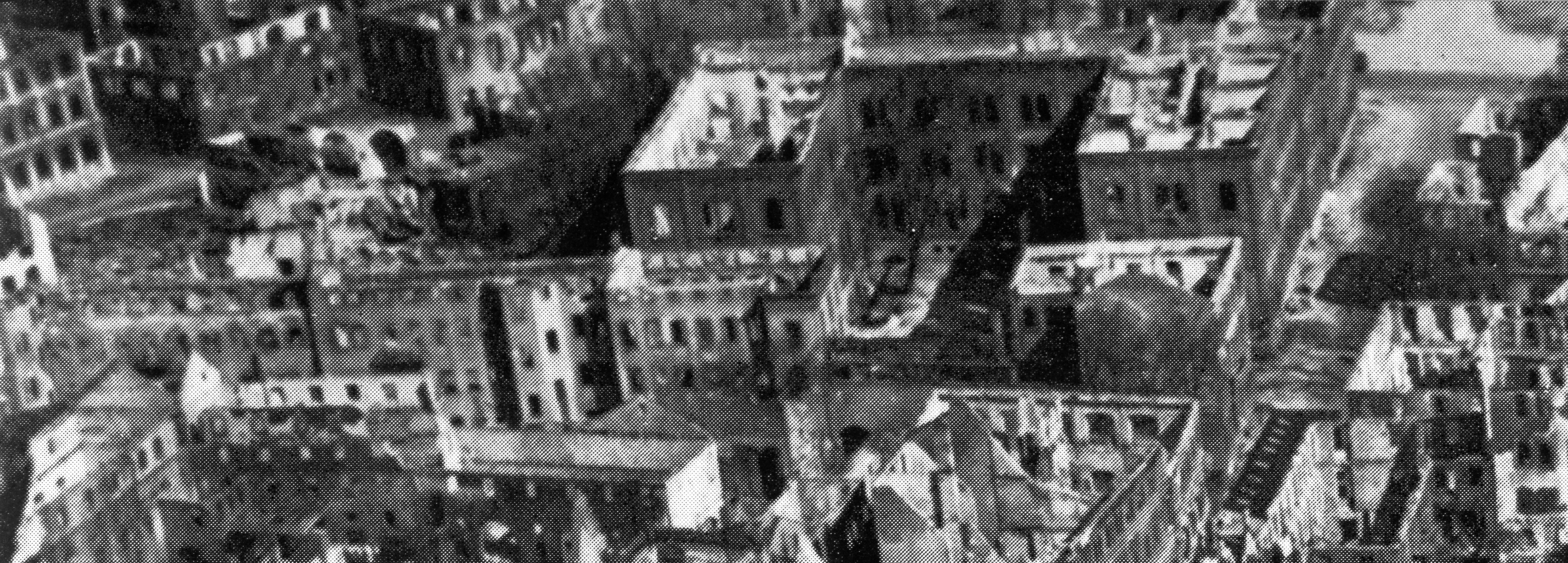 Luftaufnahme der Innenstadt des zerstörten Würzburgs im Herbst 1945, Ausschnitt: Hofstraße und Maxstraße. ehem. Chem.Institut / Fränkisches Luitpold-Museum, Maxstraße 4 Maxschule, Maxstraße 2